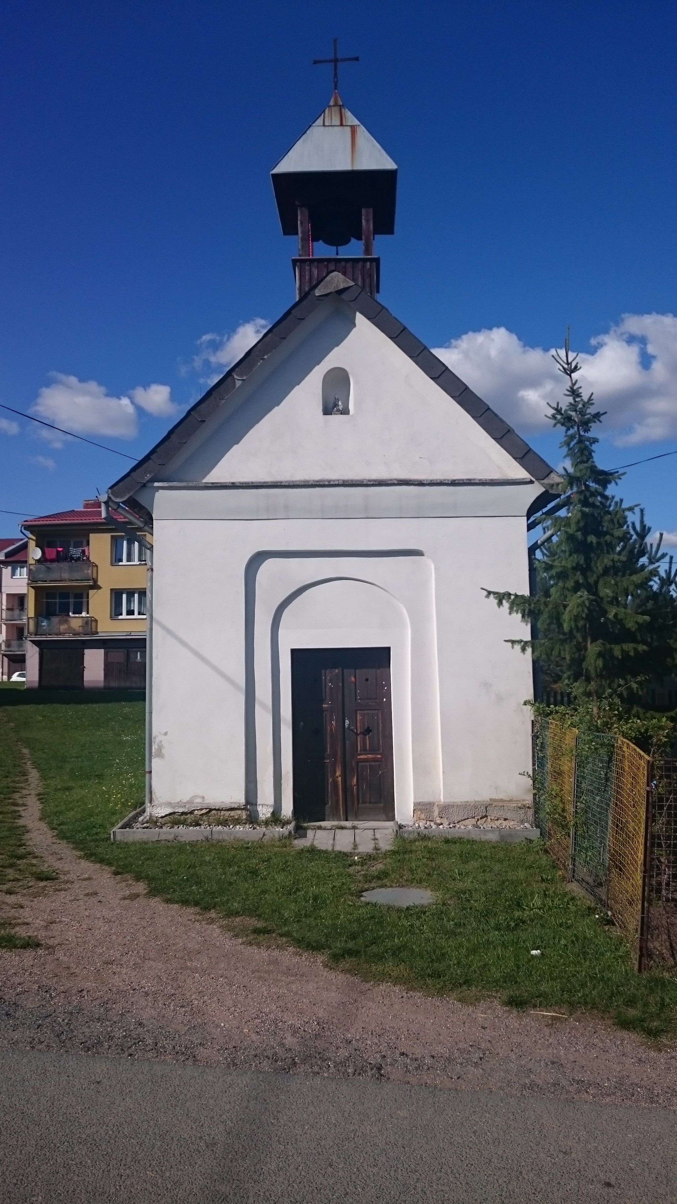 Kaplička v Bězevěrově. Okres Plzeň-sever, Česká republika.